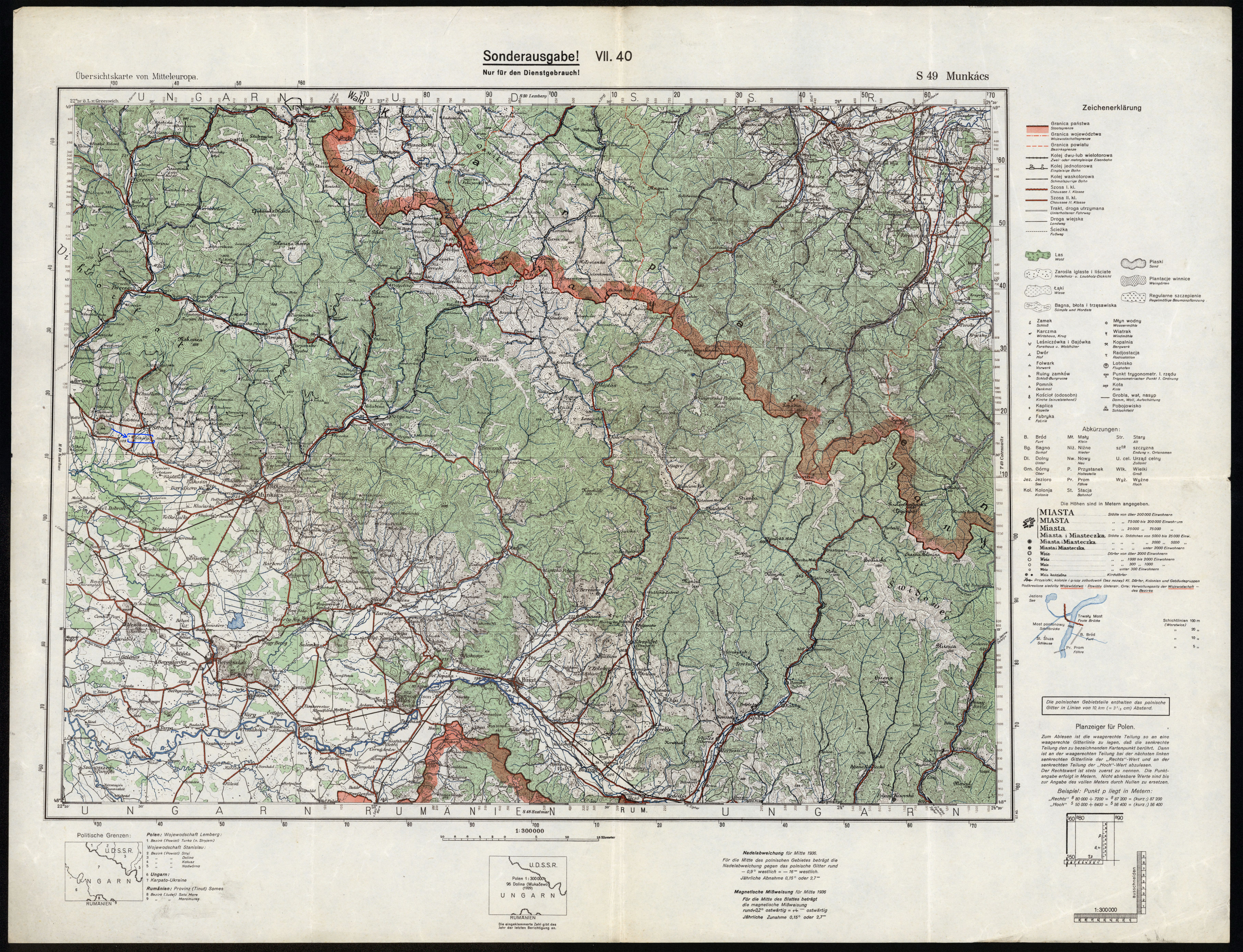 Німецька військова карта періоду Другої світової війни (карта складена 1936 року ) квадрат S49. Село Вовкове (Volkoviji) виділено синім маркером